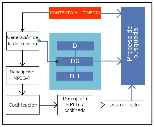 Esquema de funcionamiento del estandar MPEG-7